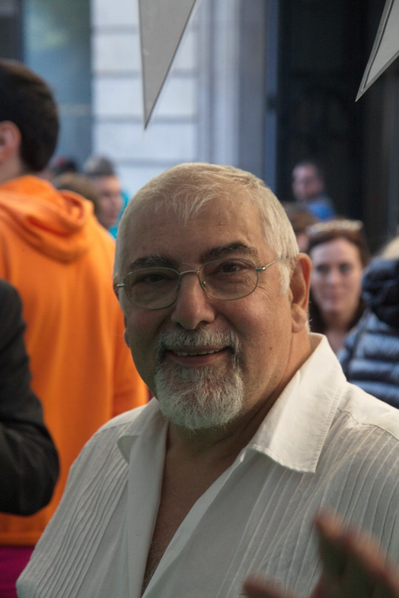 Signatura de llibres en la Diada de Sant Jordi-2015 a Barcelona